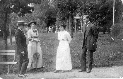 Dvarininkai Ropai Daudžgirių dvaro parke apie 1900-1910 m.